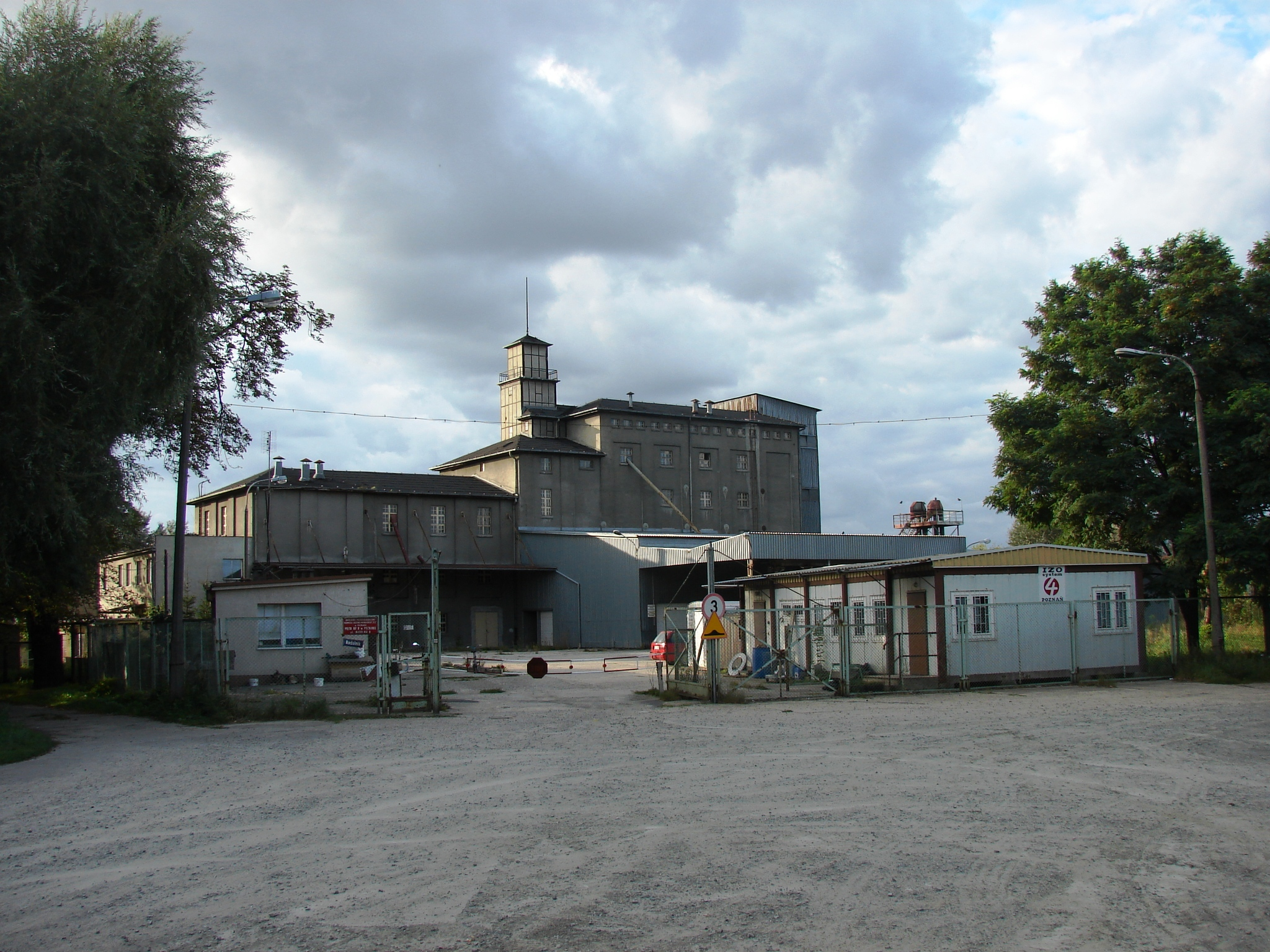 Mill No. 8 on Nadolnik Str. 8, Poznań